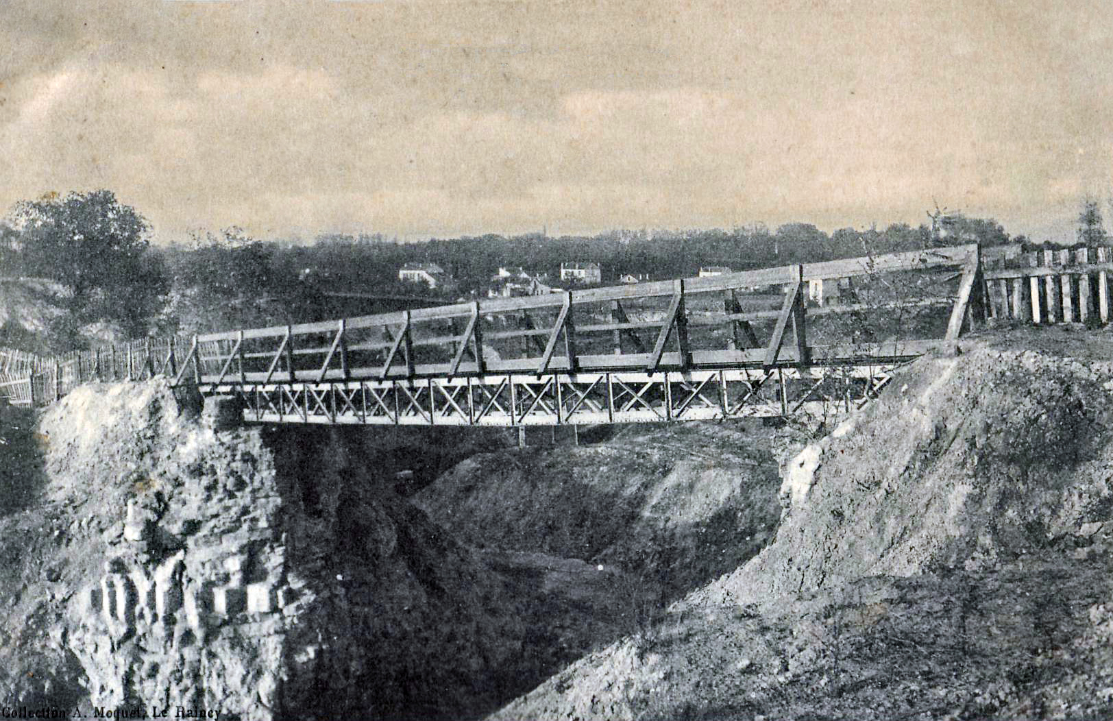 Carte postale ancienne éditée par A. Moquet, éditeur au Raincy : LIVRY - La Passerelle